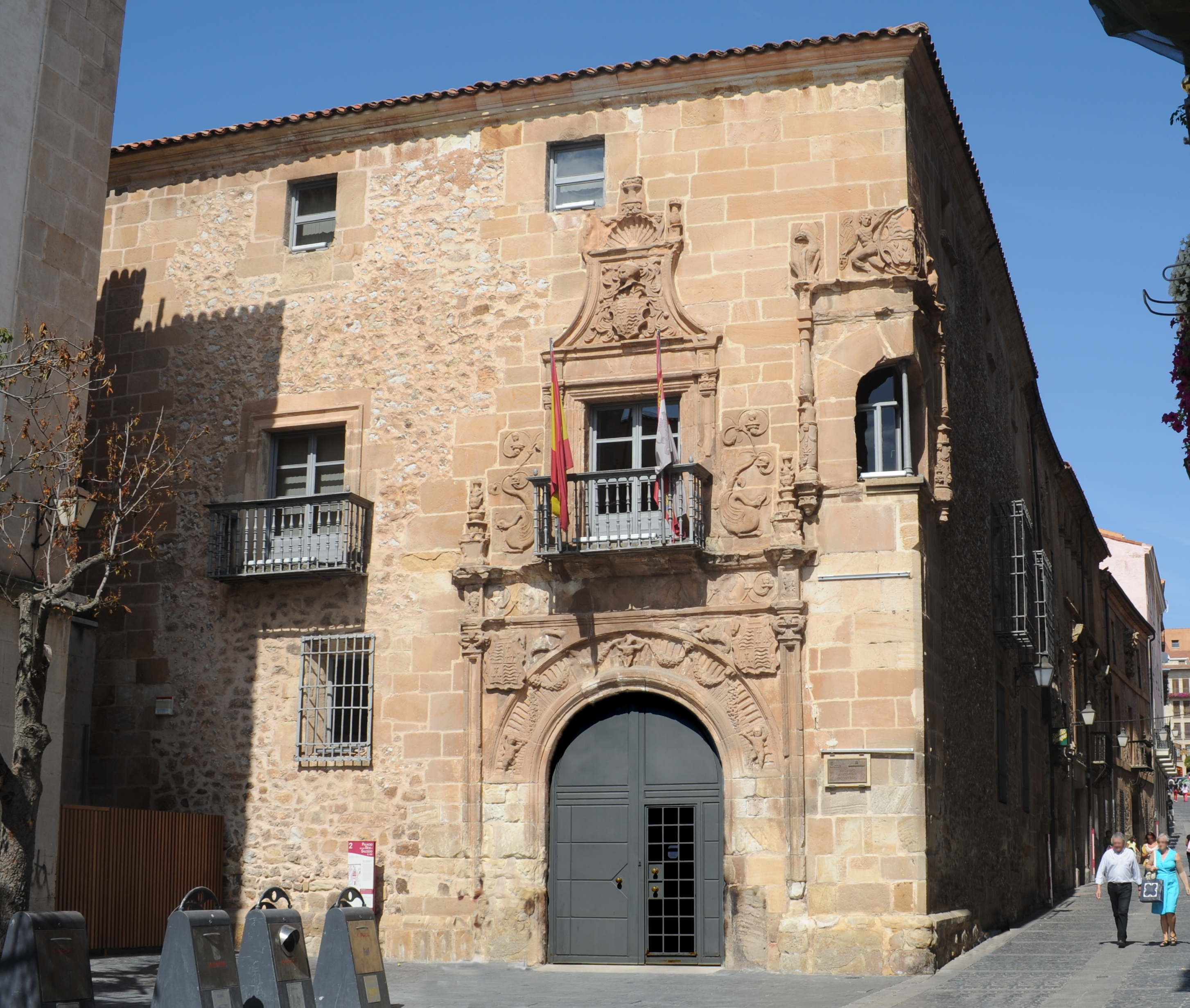 Palacio de los Ríos y Salcedo (Soria), mandado construir por Alfonso de Ríos y Salcedo en 1549. En este edificio renacentista se observa la influencia de arquitectónica de los palacios cacereños traídos a tierras castellanas debido a la trashumancia. La actividad económica principal de este noble fue la ganadería trashumante.